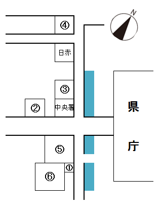 静岡市役所庁舎の移転を図に示したものです。